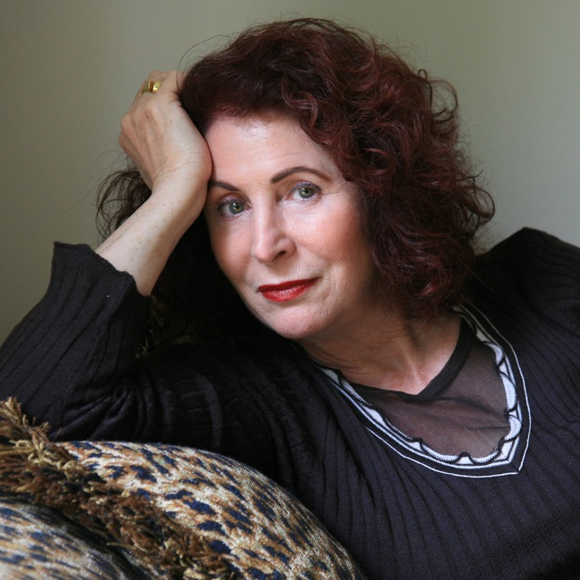 דליה לוין